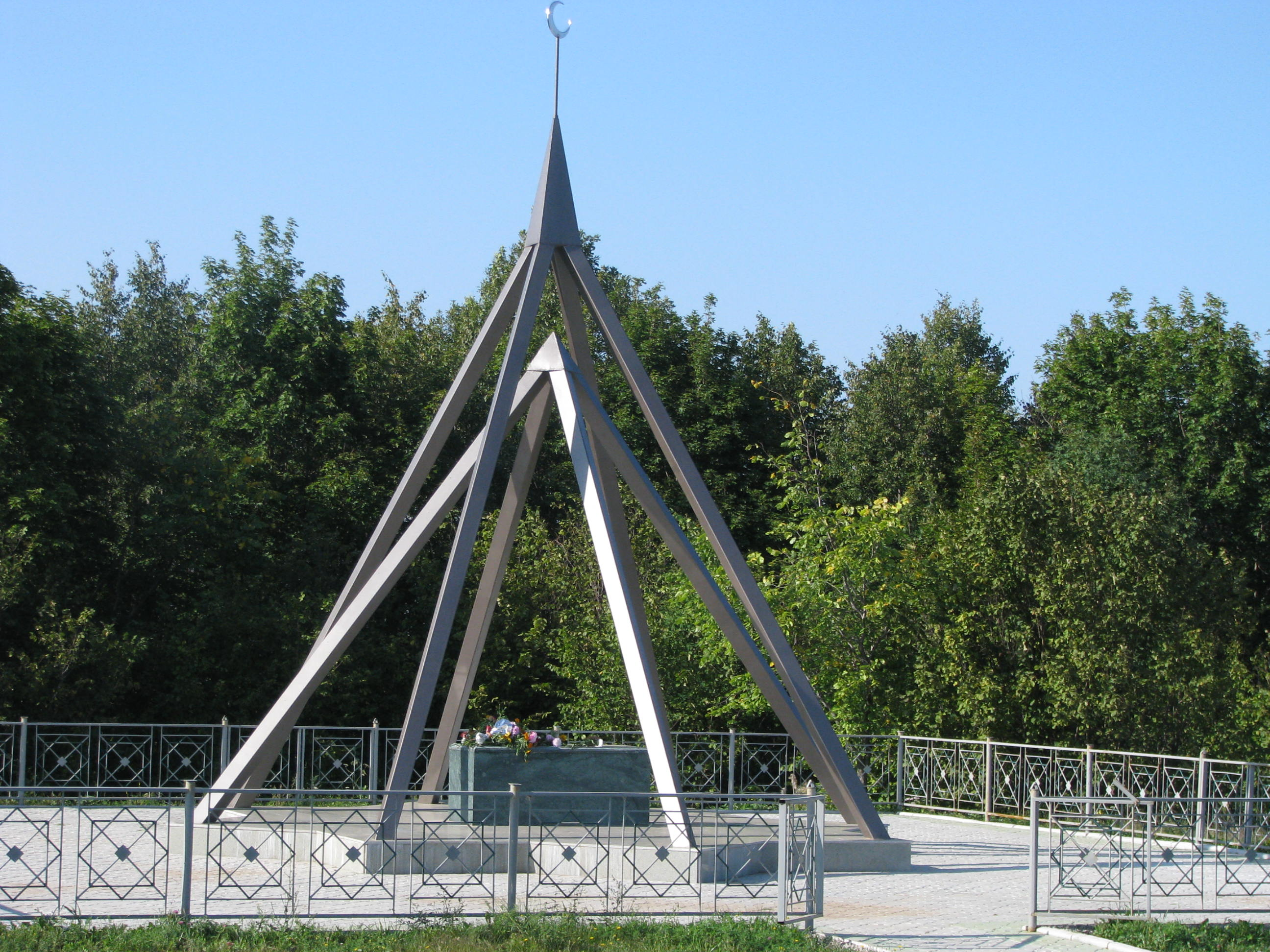 В сентябре 2008 года на родине поэта, вблизи села Миништы Дюртюлинского района, на его могиле был открыт мемориальный комплекс.